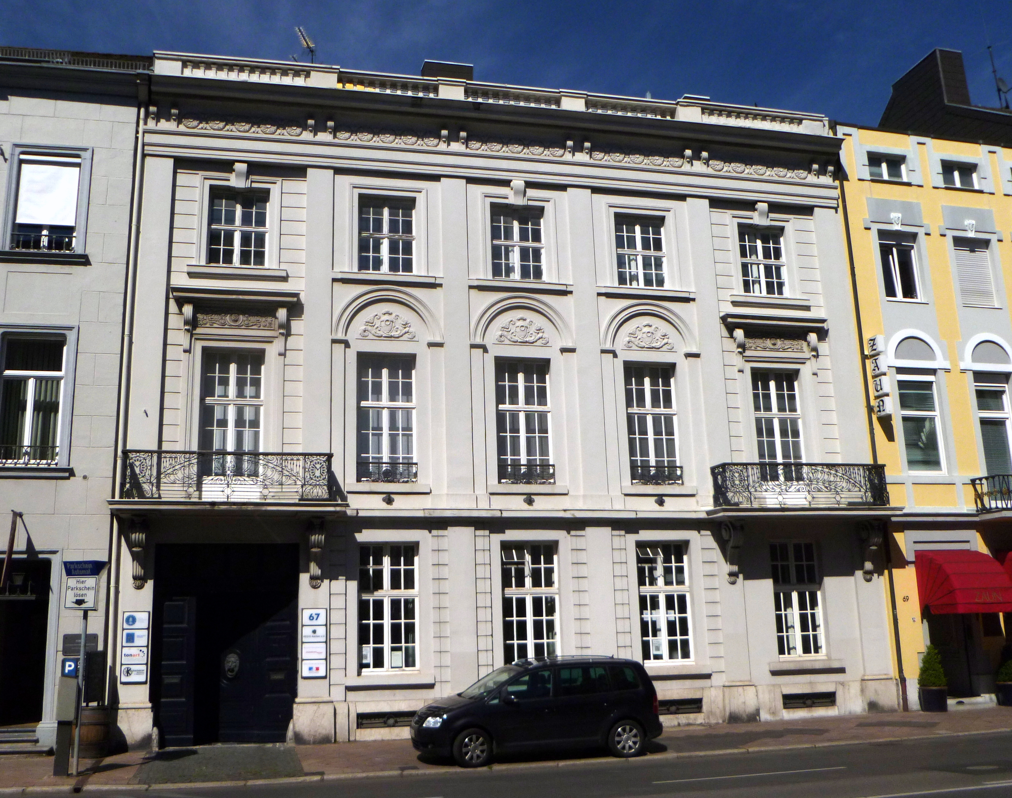 Haus Matthéy in Aachen, Theaterstraße 67, Baudenkmal in Aachen